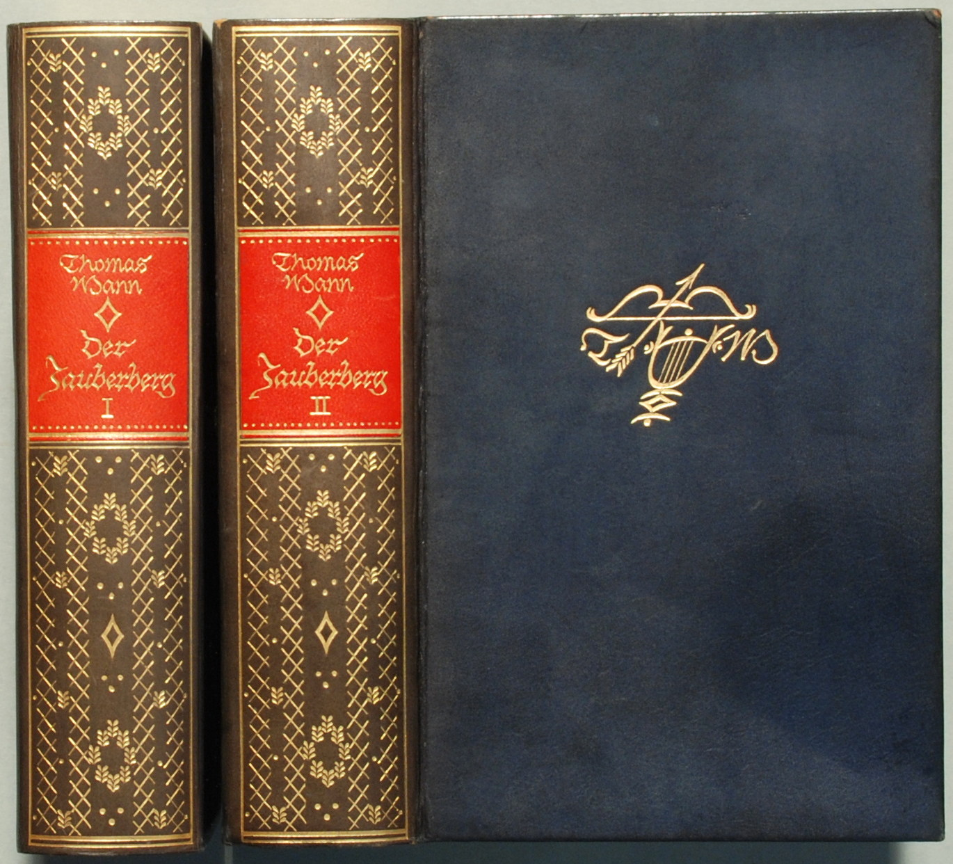 Thomas Mann. Der Zauberberg. Roman. Berlin: S. Fischer 1924, 2 Bde. 578 u. 629 Seiten. Erstausgabe (Potempa D 3.1, Bürgin I 23, Wilpert/Gühring² 28). Blaues Orig.- Ganzleder 19 x 12 cm, Hadern-Velin-Papier. Expl. 10 / 150, von Thomas Mann signiert. 29. August 2008 retuschiert und freigestellt für «Erstausgaben Thomas Manns. Ein bibliographischer Atlas» [1].